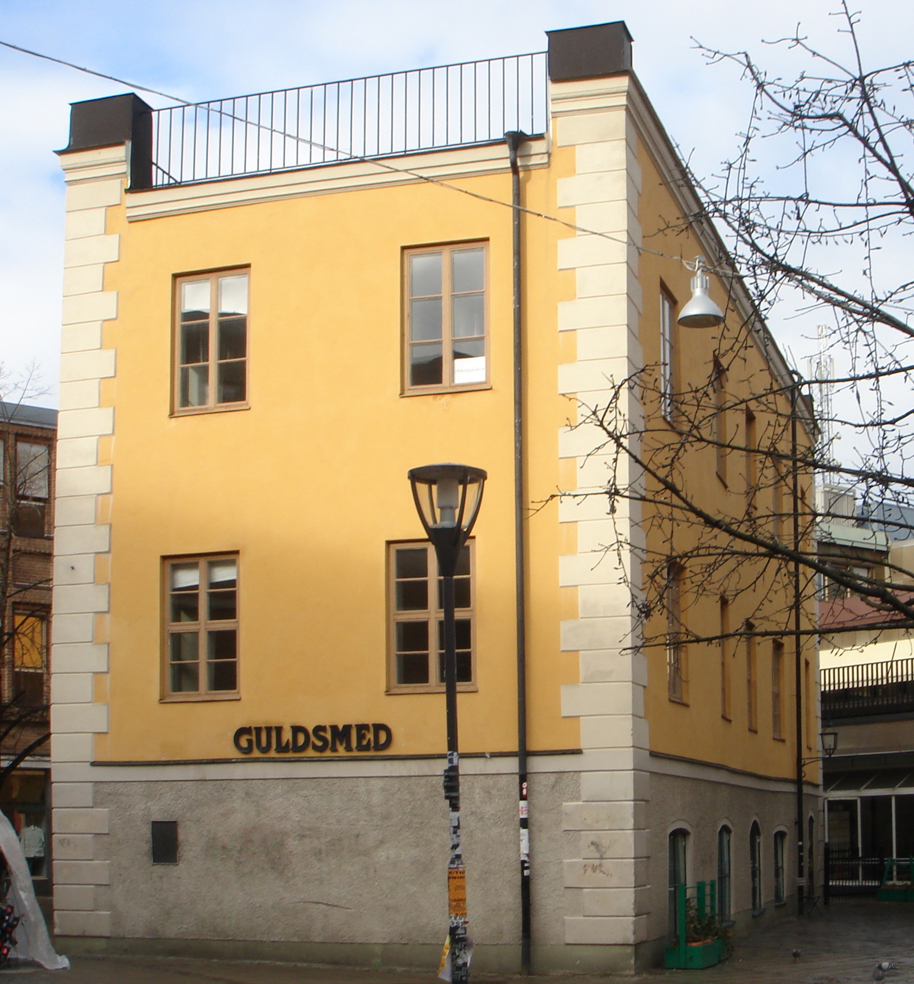 Celsiushuset in Uppsala, Sweden